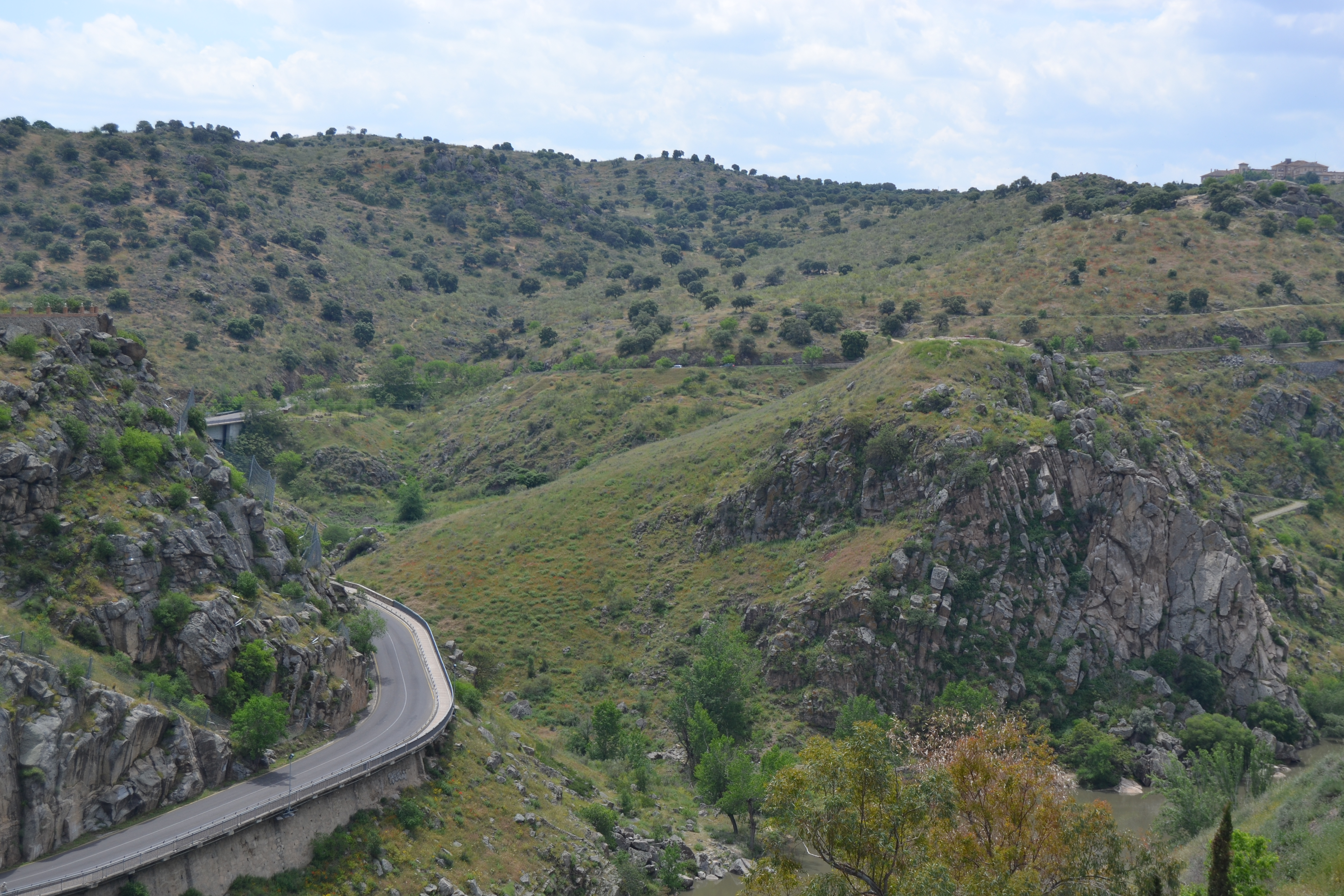 Carretera Alto. Paisajes de Toledo, Castilla-La Mancha, España. Mayo de 2016.